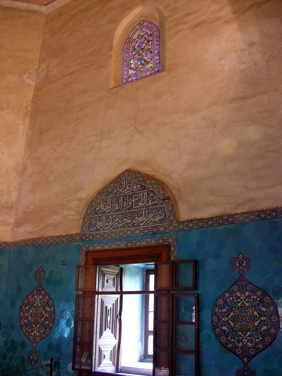 Turkey-1361